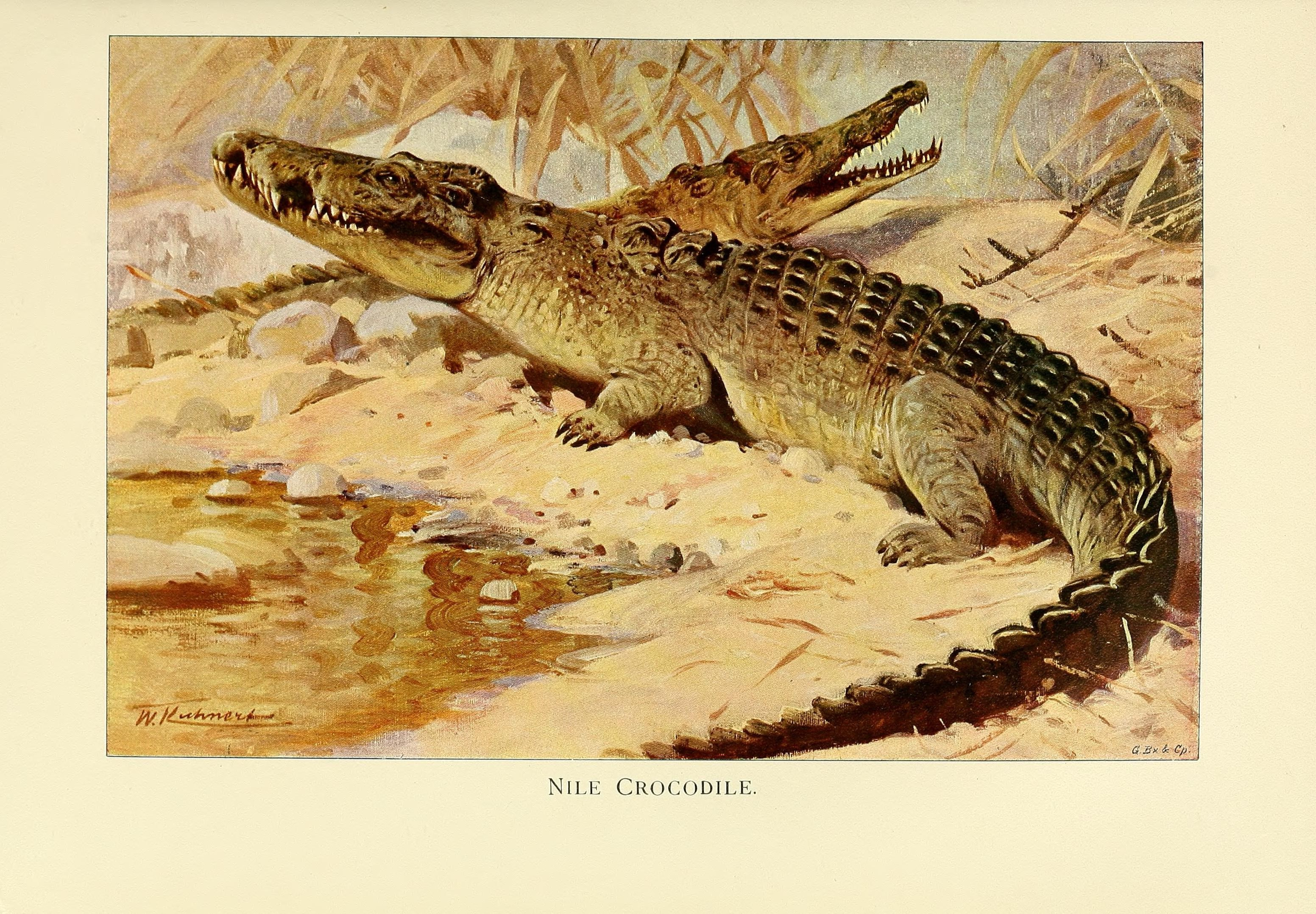 w a O u o u w